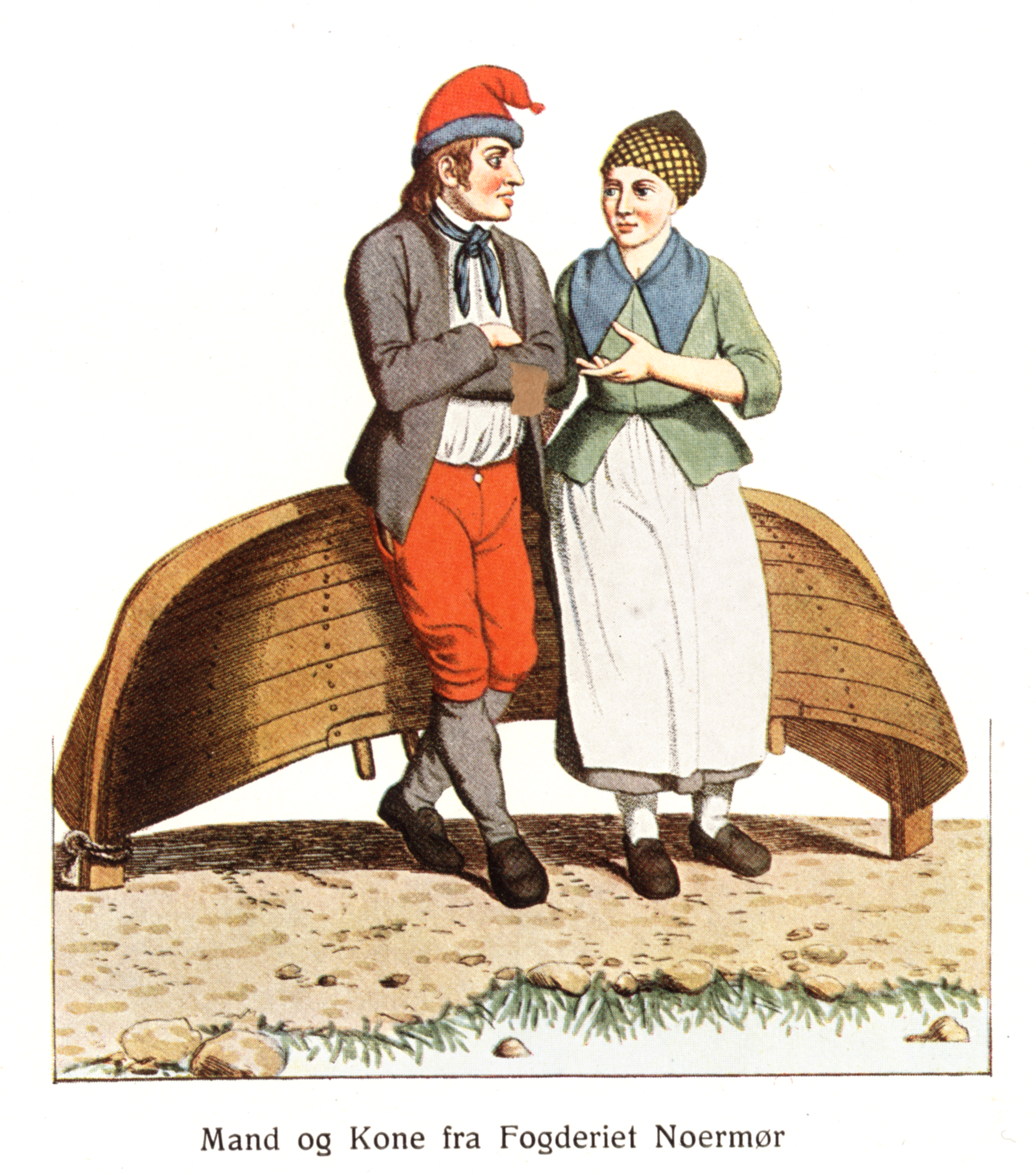 Drawing by Johan F. L. Dreier (1775-1833) early 19th century. Published in Einar Lexows «Norske Folkedragter», Norsk Folkemuseum, Kristiania 1917.